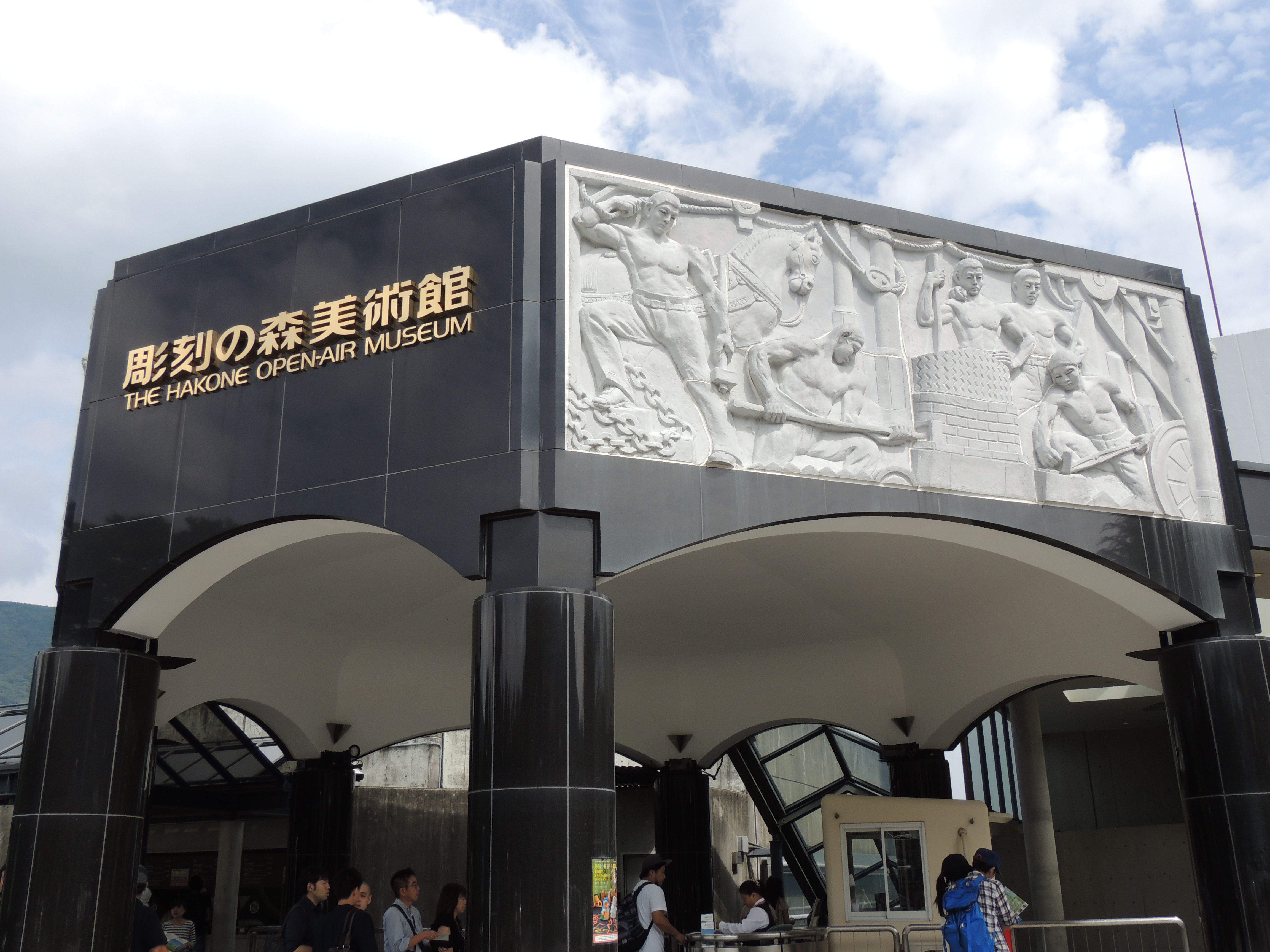 Entrée du Musée en plein air de Hakone, comprenant l'œuvre "Working People" de Taime Tatehata